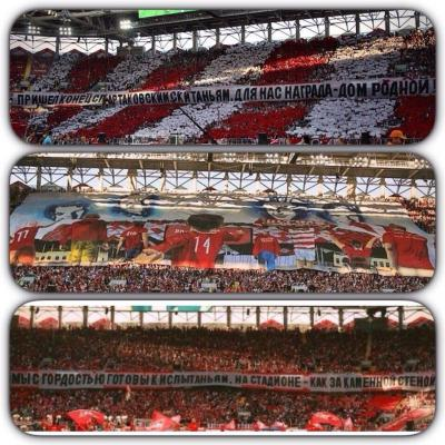 Перфомарманс на три трибуны